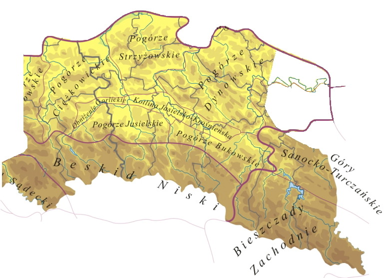 Rozmieszczenie grup etnograficznych na mapie hipsometrycznej Podkarpacia